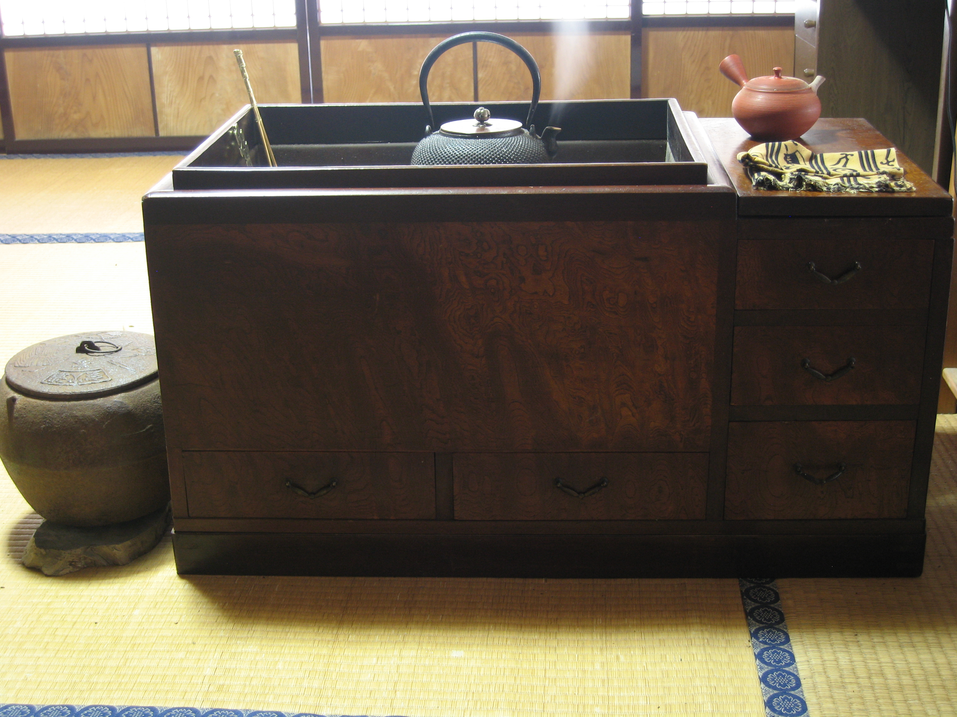 日本の長火鉢